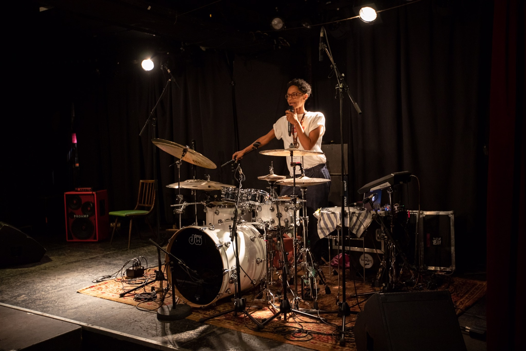 Tsoungui beim Drum and Bass Fesival 2019 in Dresden (21. September 2019 in der Groovestation)